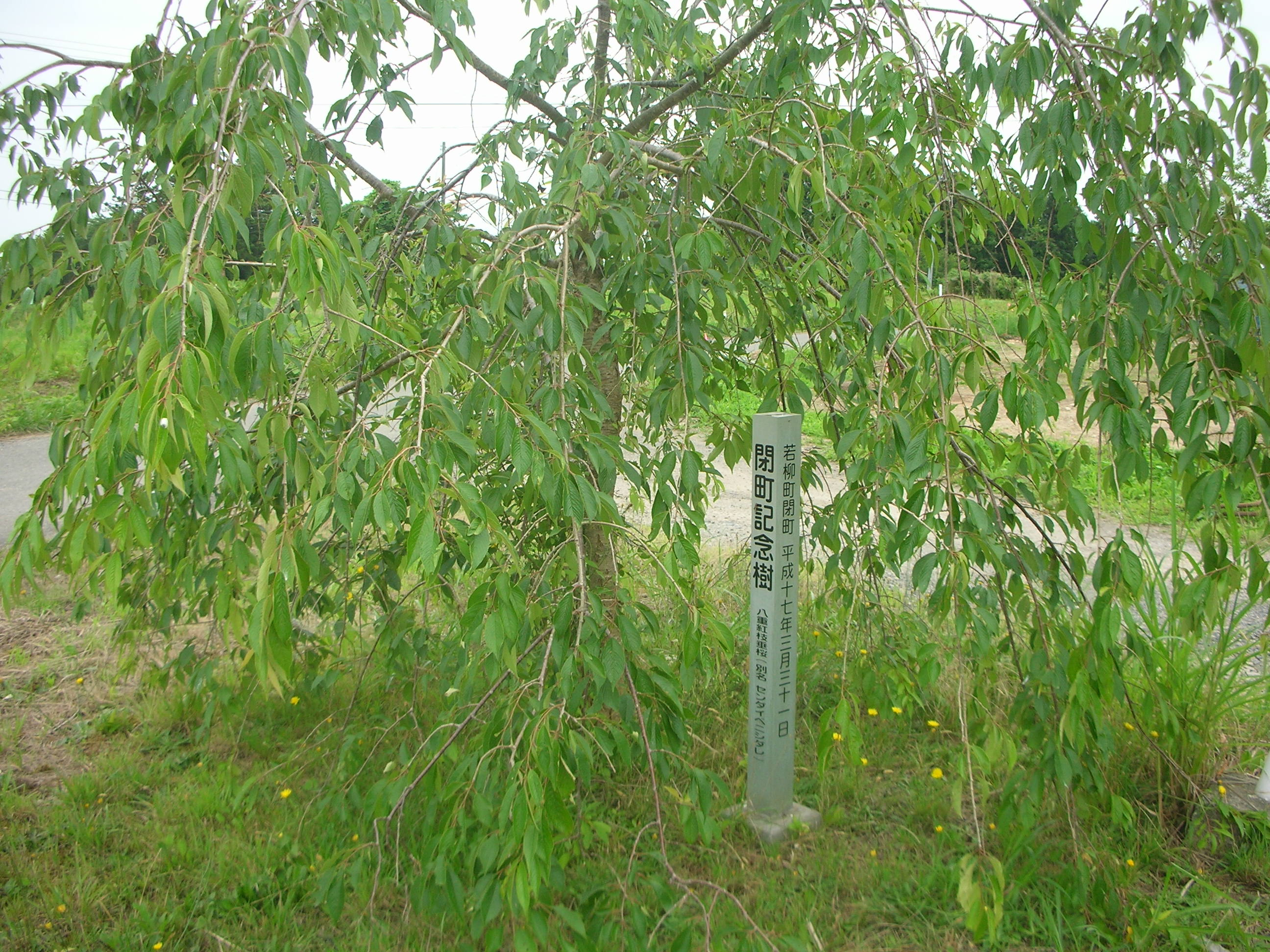 栗原郡若柳町